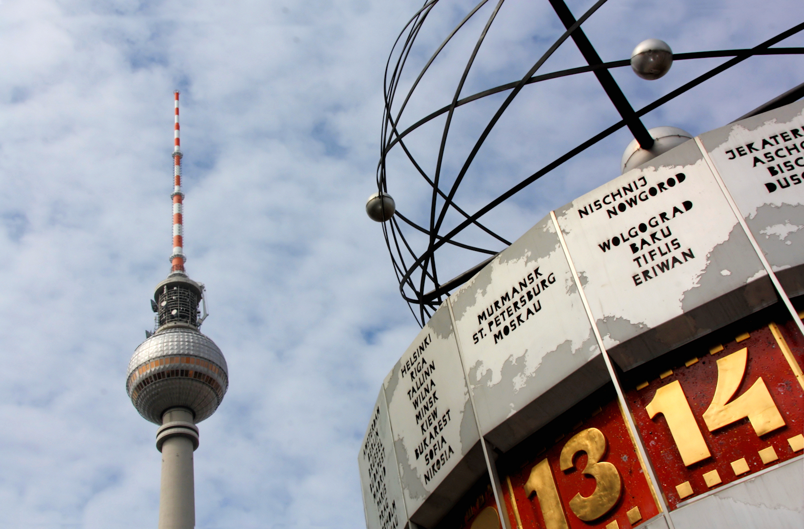 Berlin, Alexanderplatz, Fernsehturm, Weltzeituhr, Deutschland